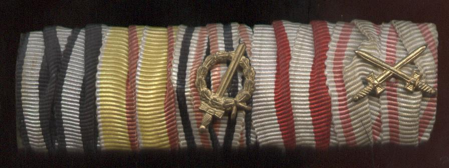 Ehrendenkmünze des Weltkriegs, Bandschnalle mit Kampfabzeichen Miniatur.